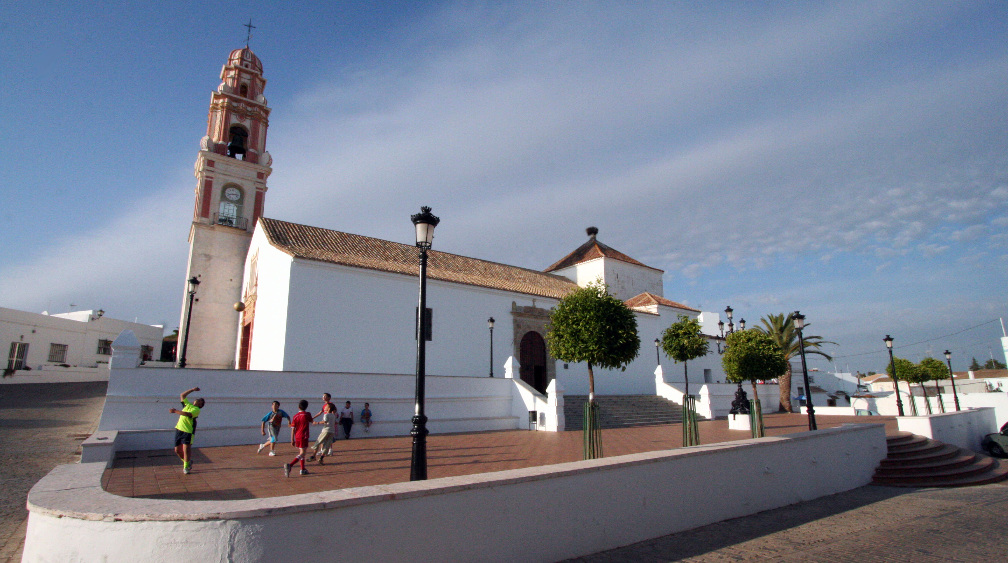 Parroquia del Salvador. Barrio de la Villa. Ayamonte. Huelva. España.